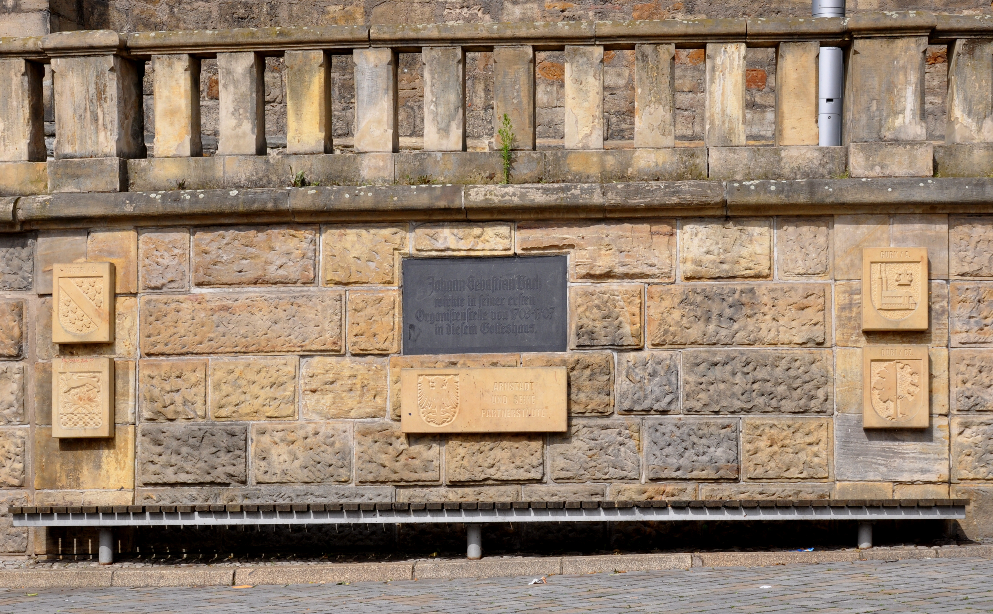 Arnstadt (Thüringen), Bach-Gedenktafel am Fuße der Bachkirche (Nähe Hopfenbrunnen)